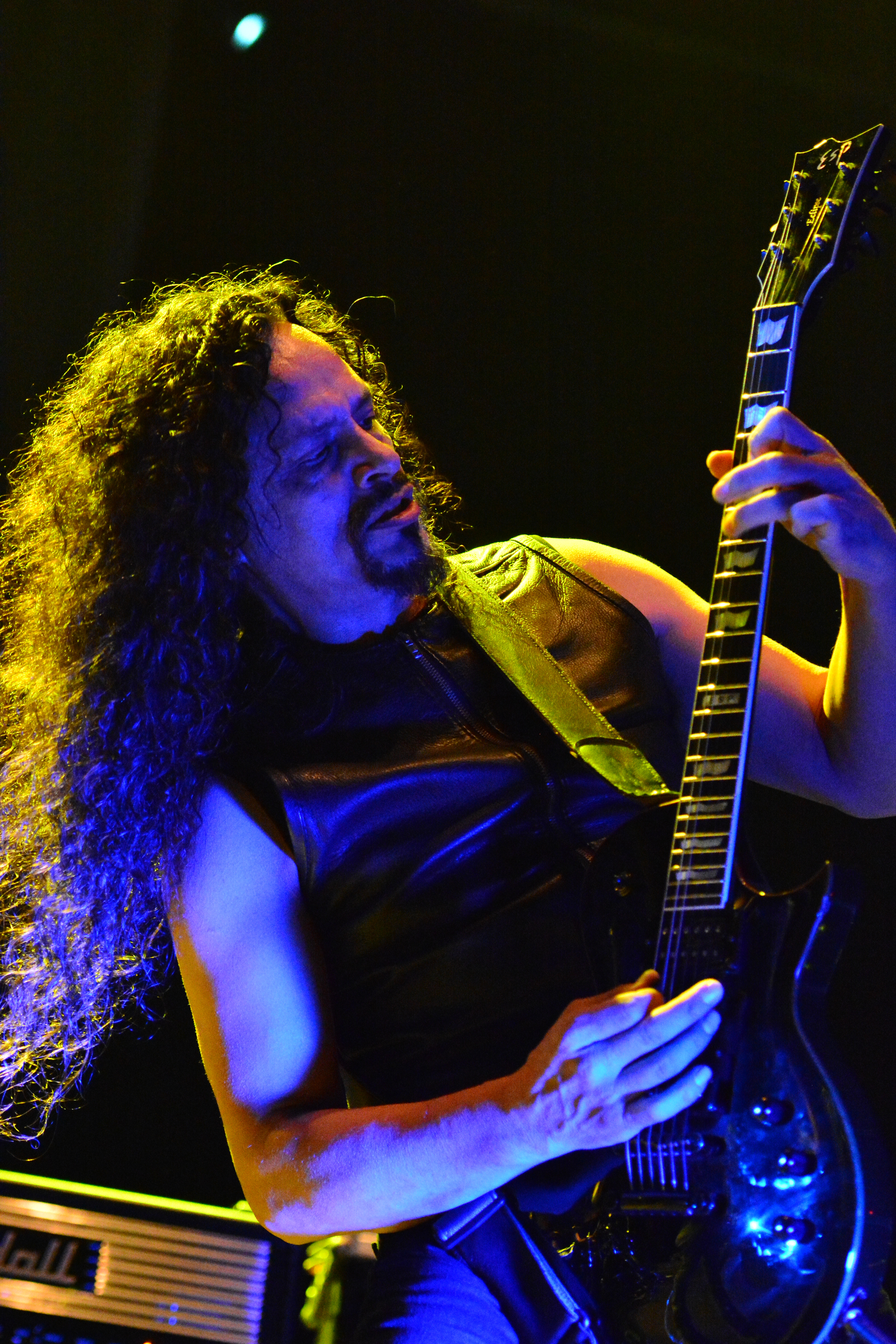 Armored Saint beim Waterkant X-Mas Bash 2015 in der Sporthalle Hamburg